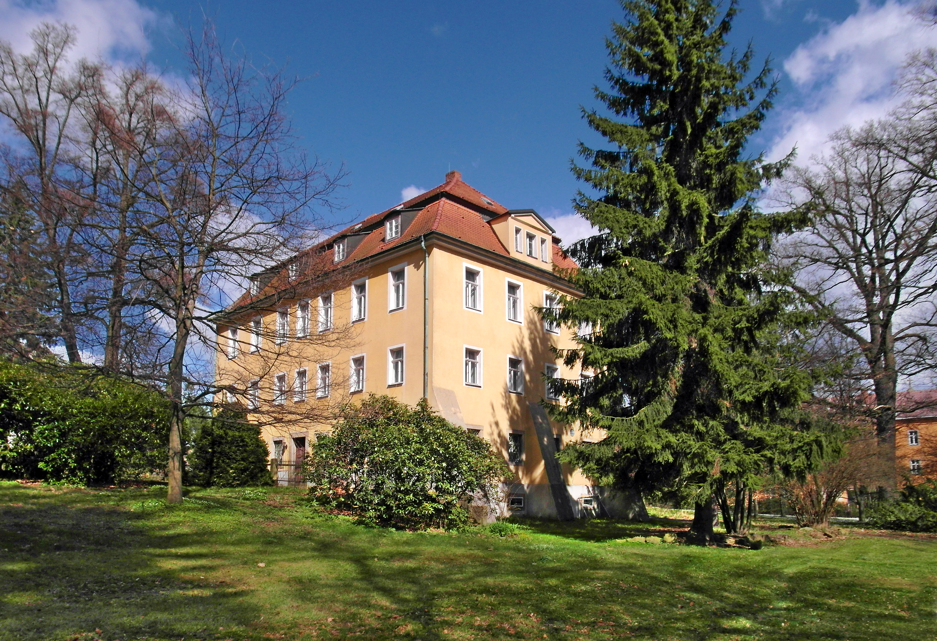 06.04.2017 02681 Schirgiswalde: Am Hof 1. Rittergut Schirgiswalde. Das Herrenhaus, auch als Schloß bezeichnet (GMP: 51.078794,14.429180). Der Oberhof gelangte 1628 an das katholische Domstift St. Petri in Bautzen. 1833 erfolgte unter Domdekan und Bischof Ignaz Bernhard Mauermann ein Umbau seines Sommersitzes. Nach 1922 wurde das Haus als kirchliche Musikschule genutzt. Ab 1970 diente das Schloß als St. Pius-Haus der katholischen Fürsorge für Kinder und Frauen. Zuletzt war im Haus ein Kindergarten, bis dieser in die sanierte Scheune gegenüber verlegt wurde. Das Schloß soll verkauft werden. Sicht von Südwesten. [SAM9262.JPG]20170406360DR.JPG(c)Blobelt